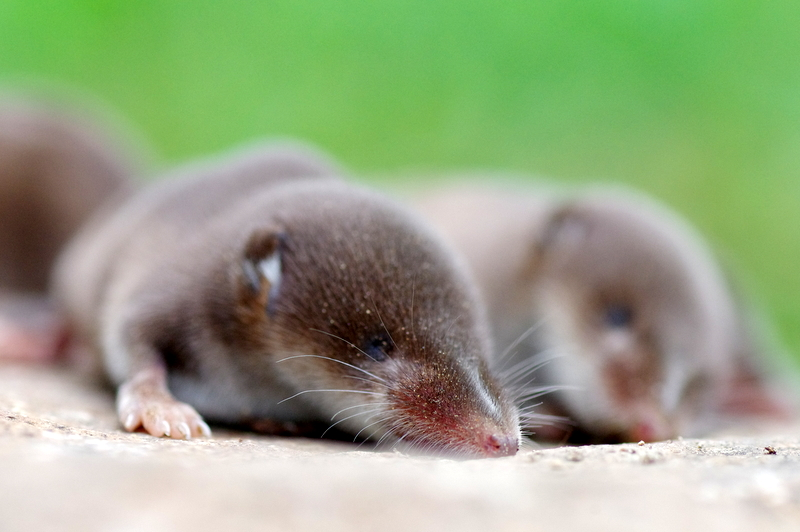 Młode ryjówki aksamitne (Sorex Araneus)